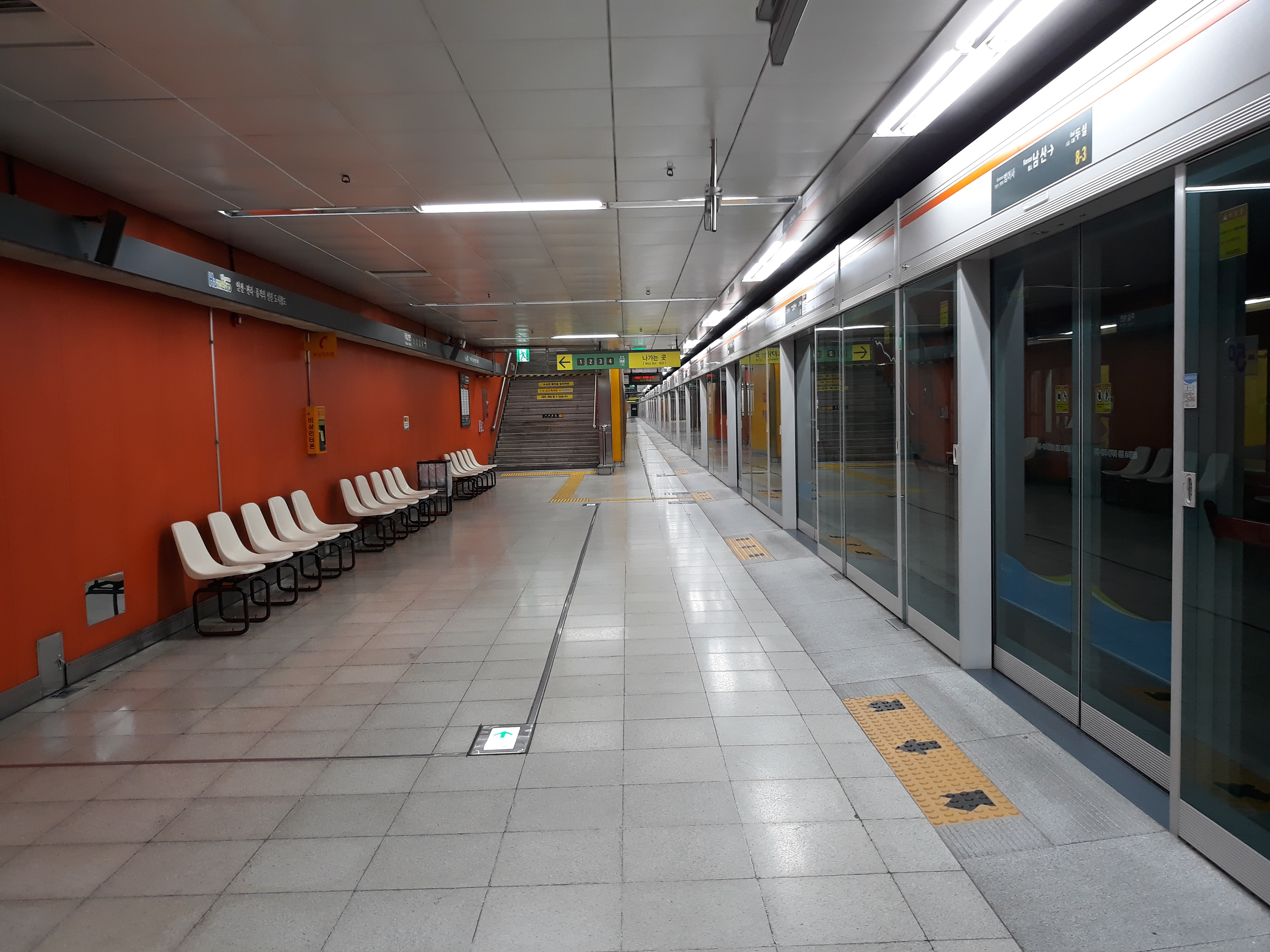 부산 도시철도 1호선 남산역 다대포해수욕장 방면 승강장